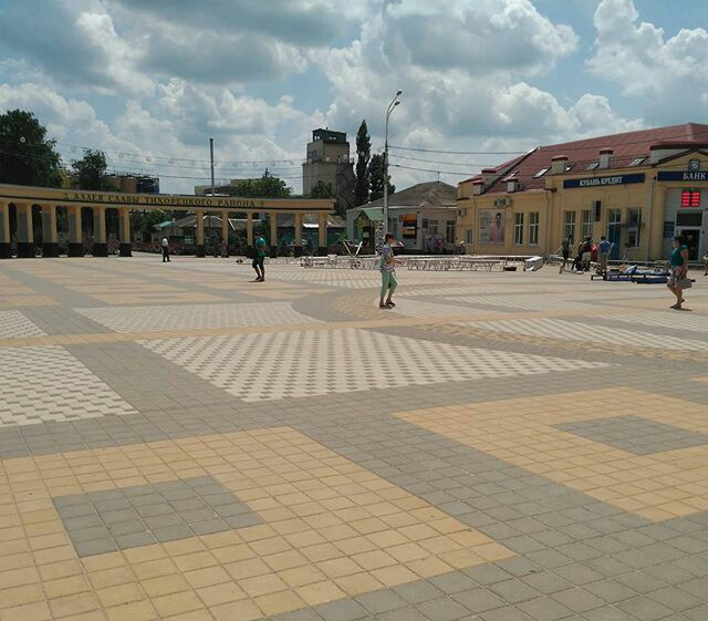 Аллея в городе Тихорецк